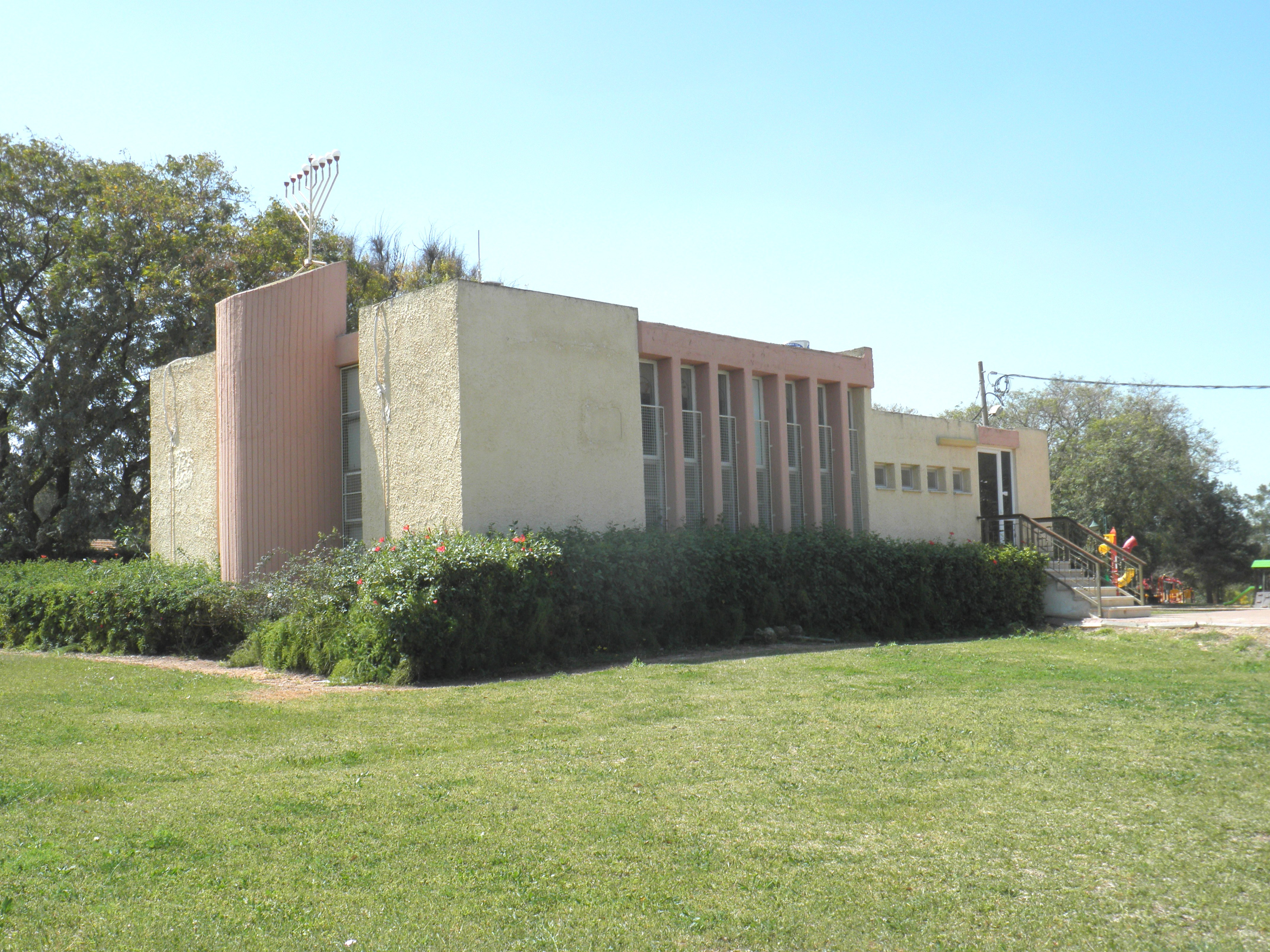 בית הכנסת